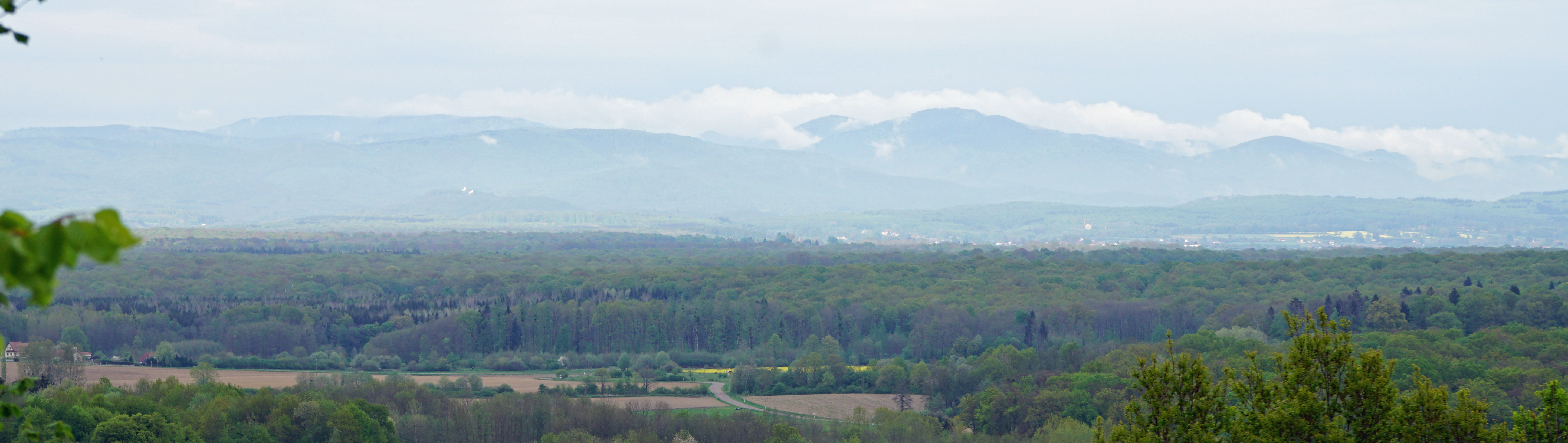 Paysage depuis le Mont de Gouhenans après un pluie printanière ; avec les Vosges brumeuses.